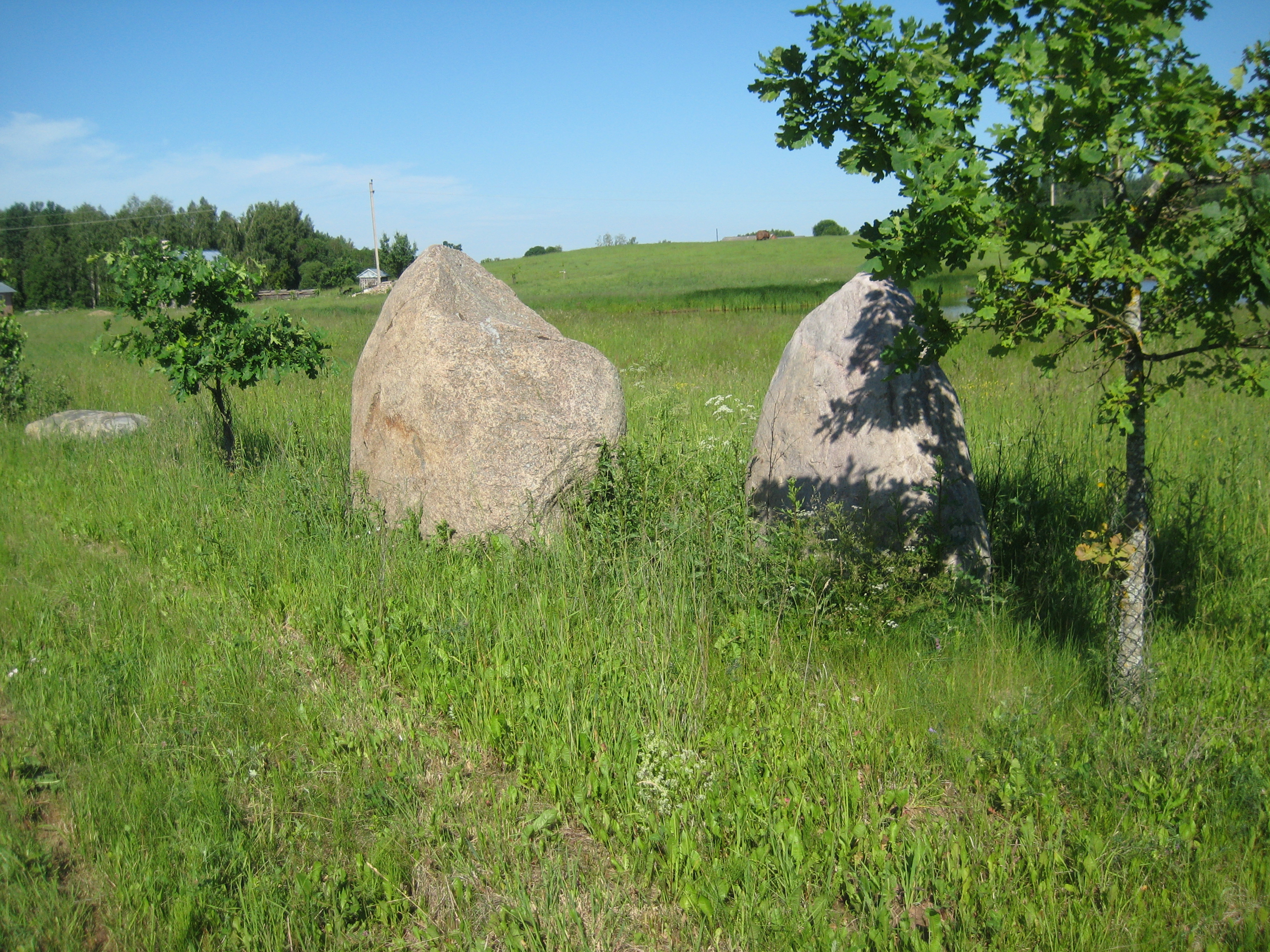 Dusetų sen., Lithuania